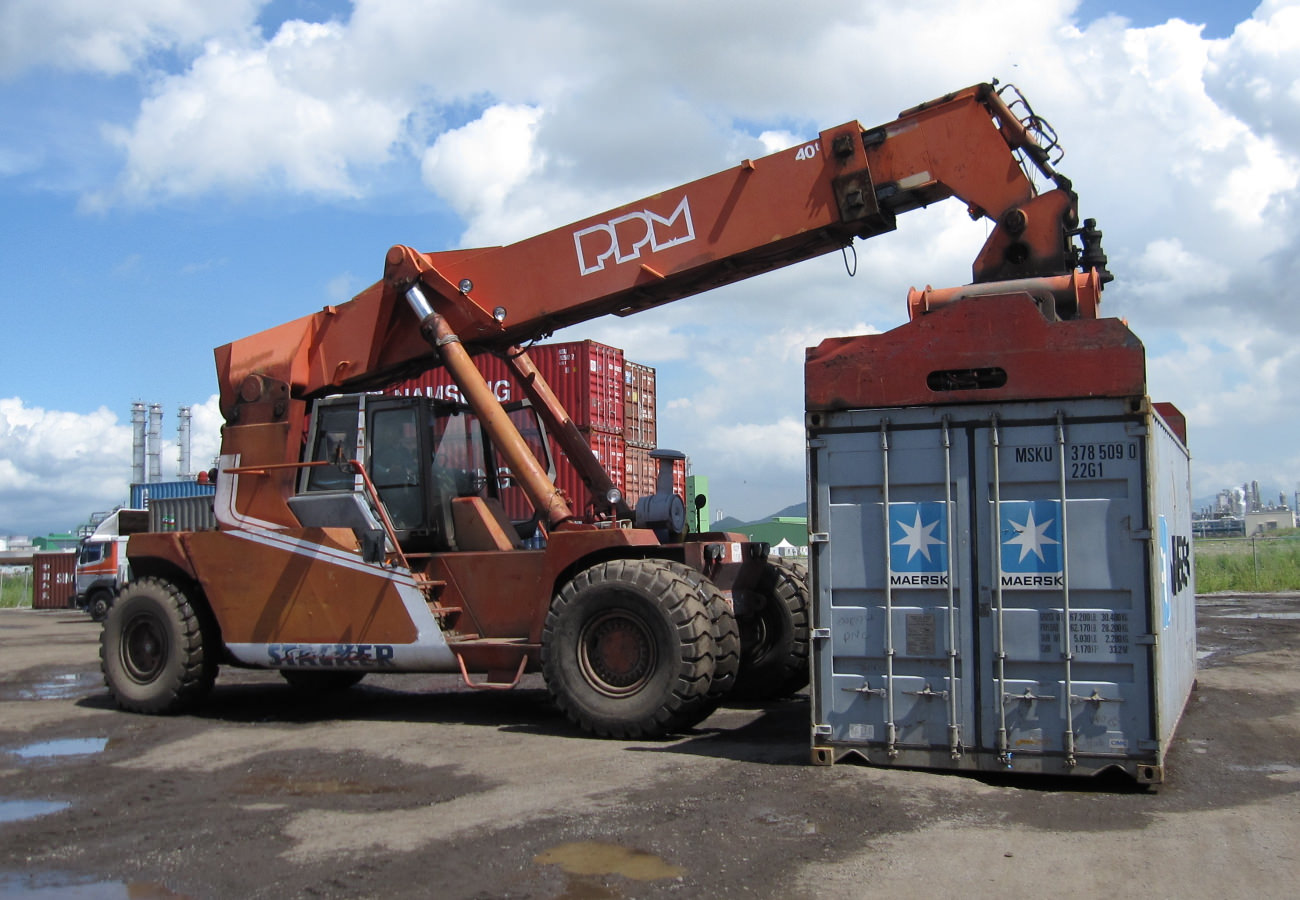 Reach stacker 40 GMI